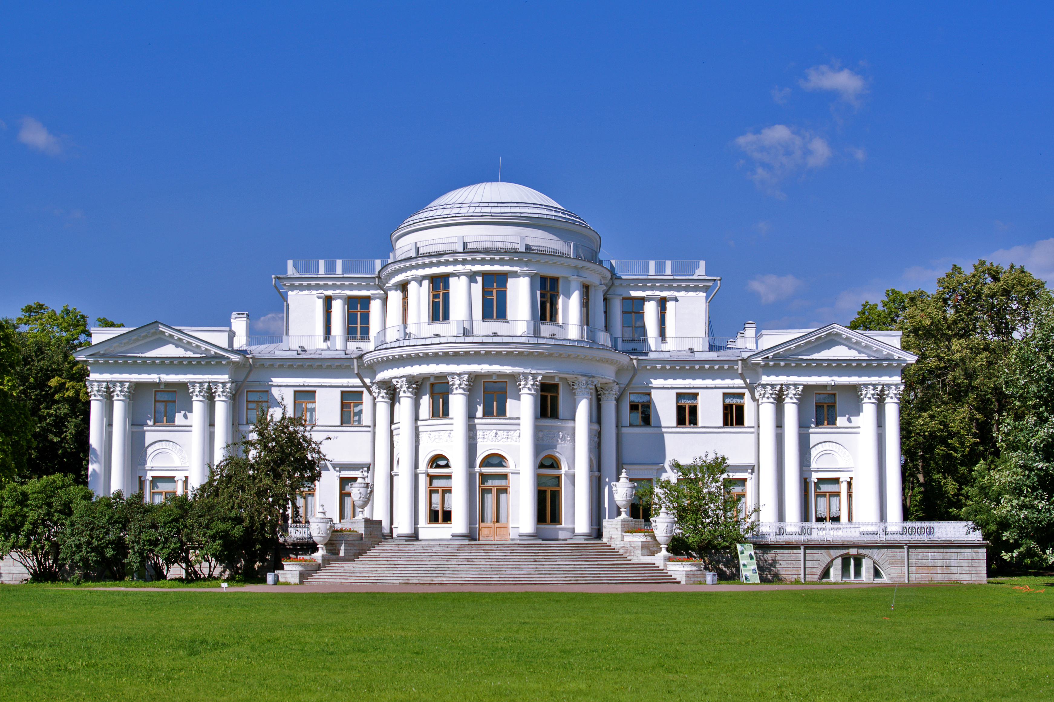 Елагин дворец: Елагин остров, 4, Петроградский район, Санкт-Петербург